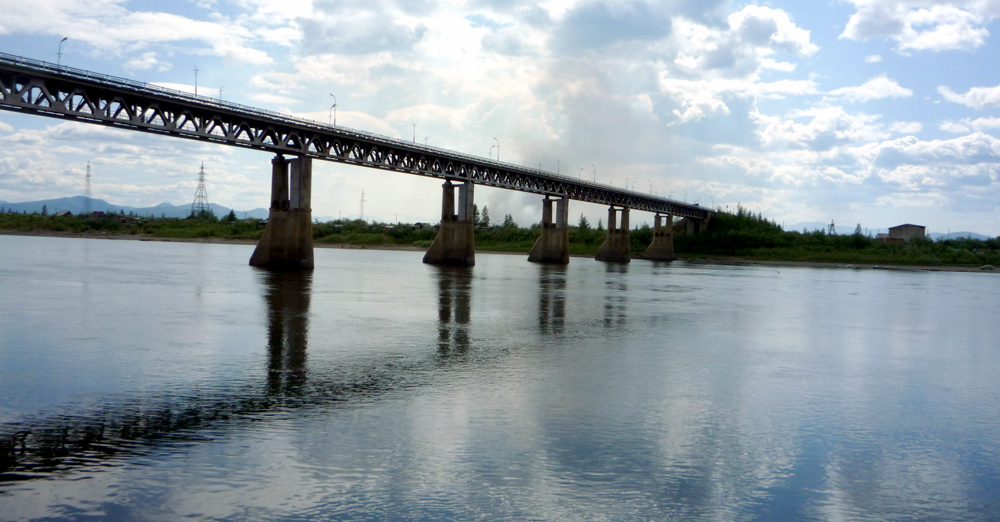 Мост через Колыму